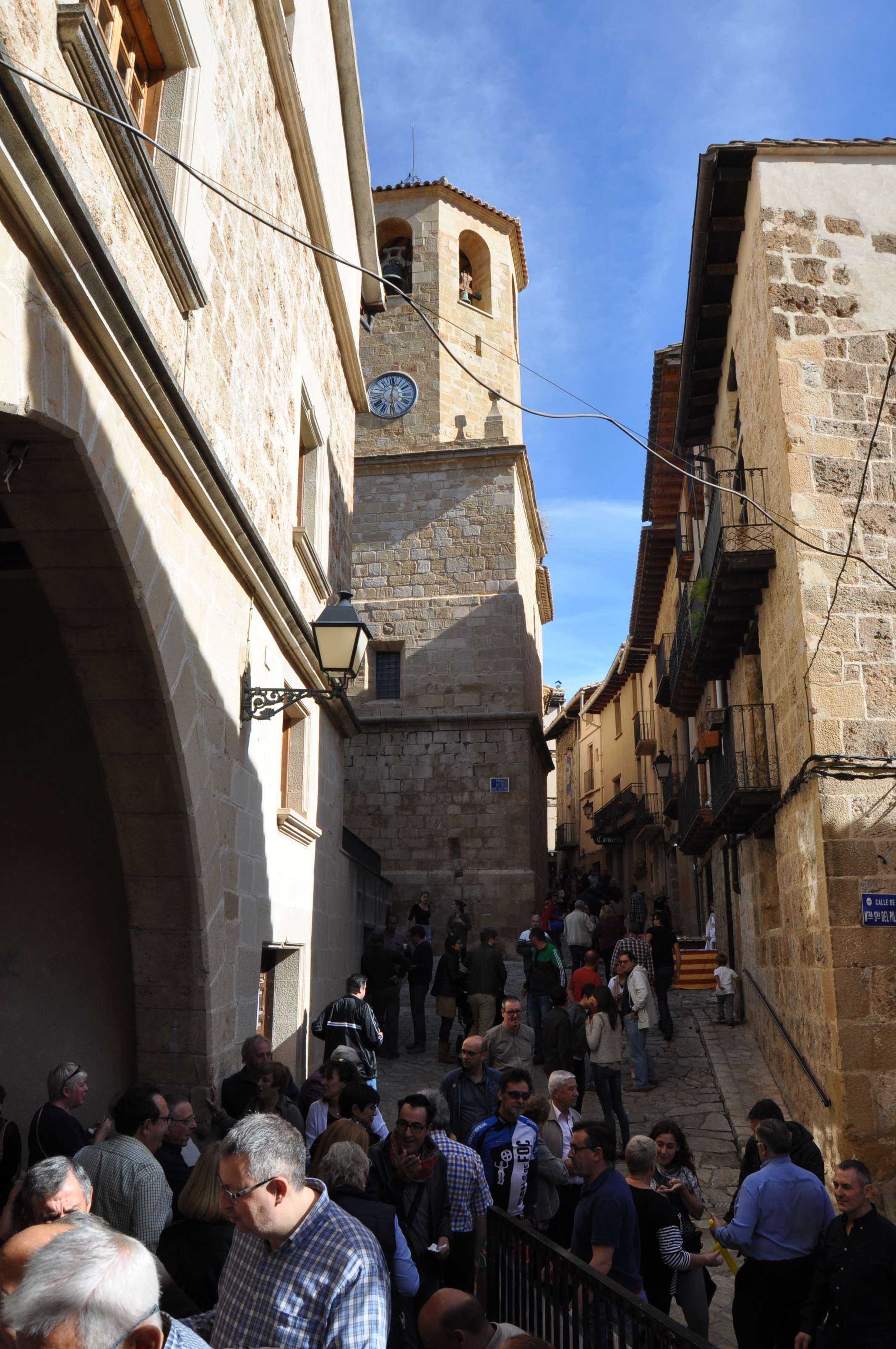 Ambiente durante la Feria micológica dels Bolets